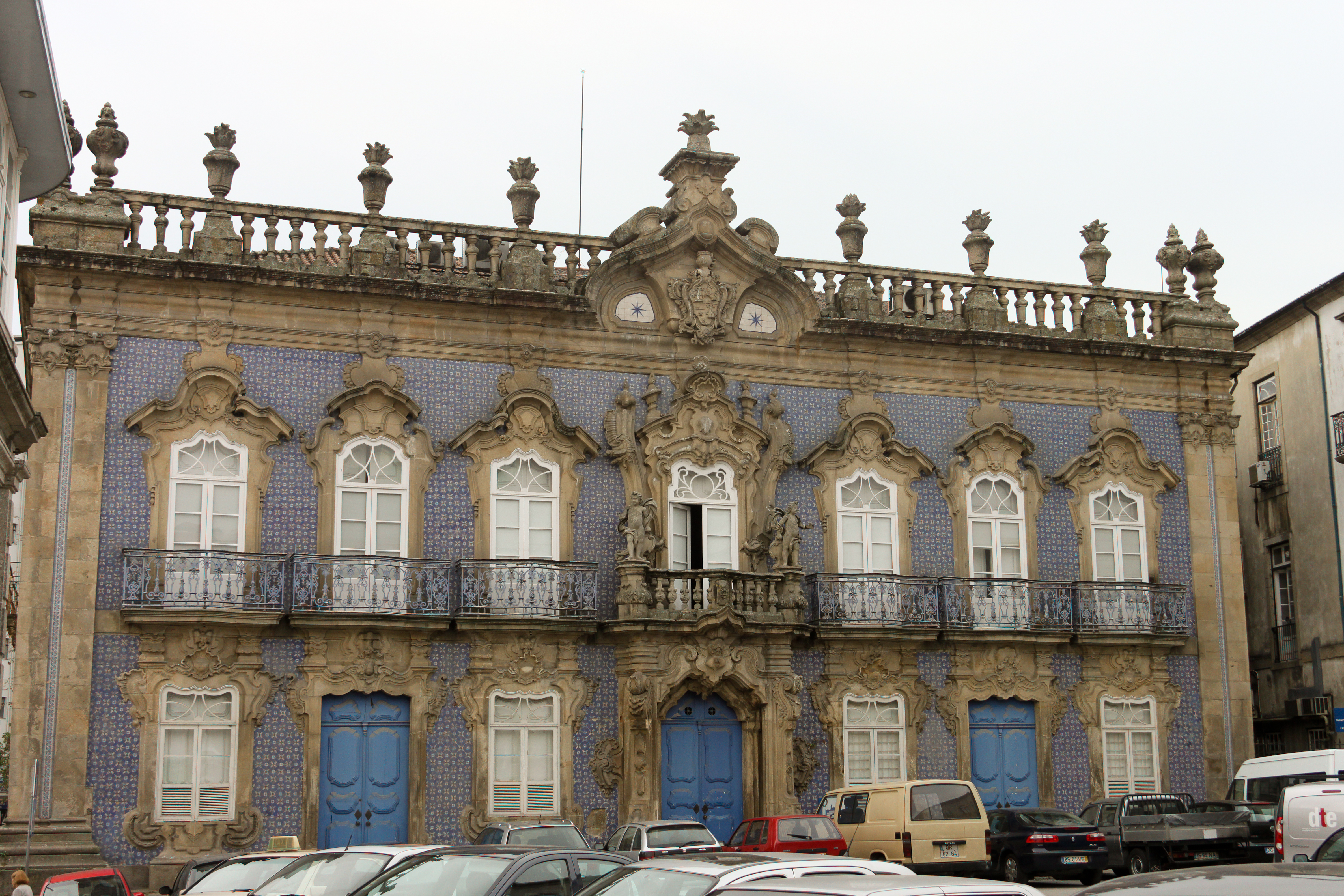 O Palácio do Raio, ou Casa do Mexicano é um palácio, construído em 1754-55. Projecto do arquitecto André Soares This file was uploaded for Wiki Loves Monuments in Portugal with the unique identifier 74588.